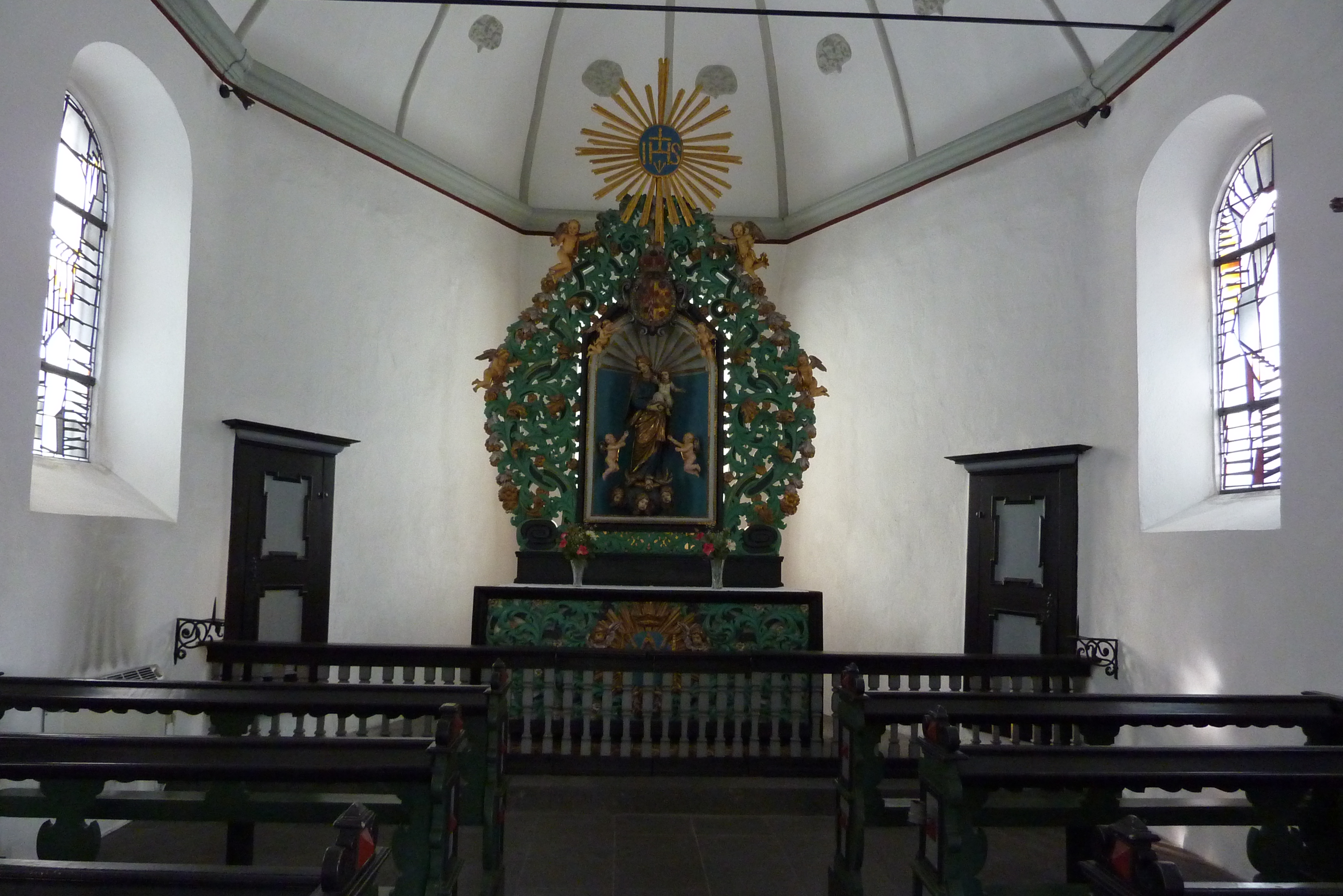 Marienkapelle in Rhöndorf, Innenansicht